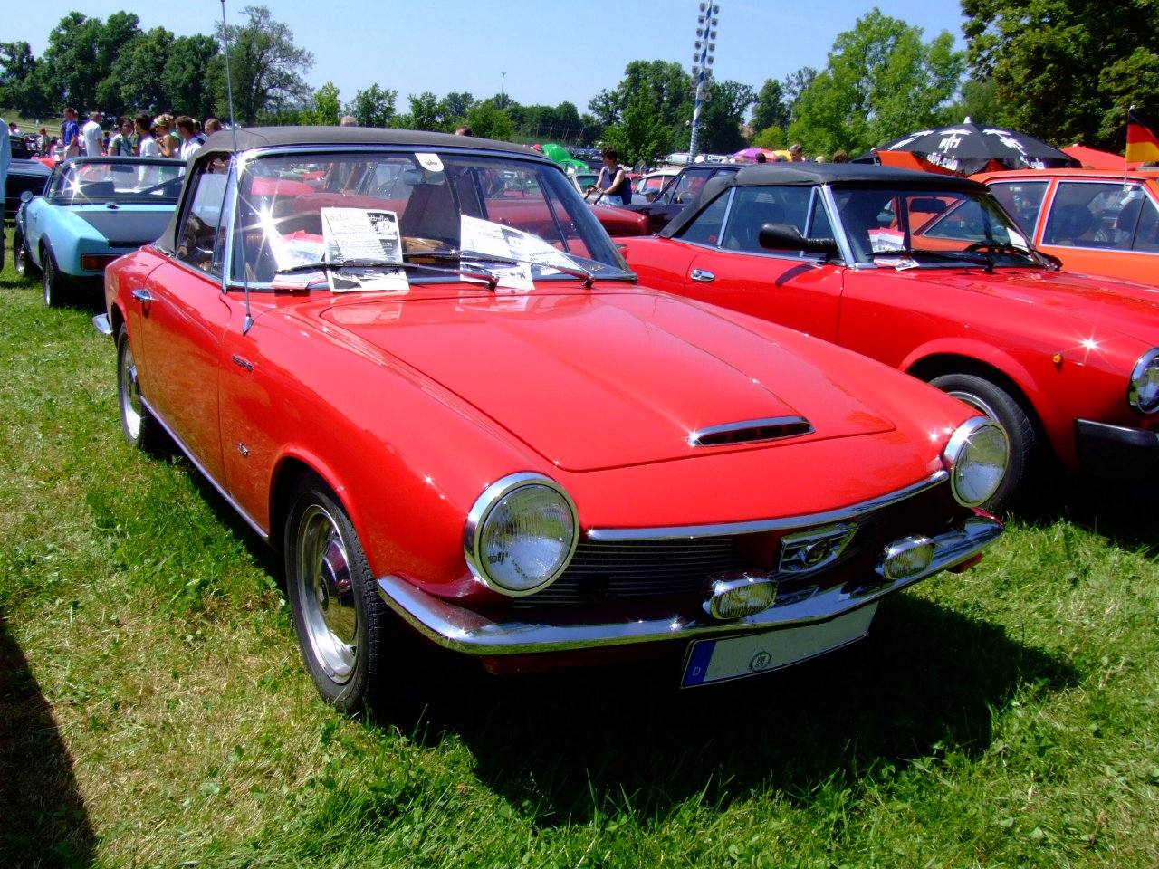 Glas 1700GT 1965 Baujahr: 1965 85 PS 4 Zylinder 1281 ccm 175 km/h